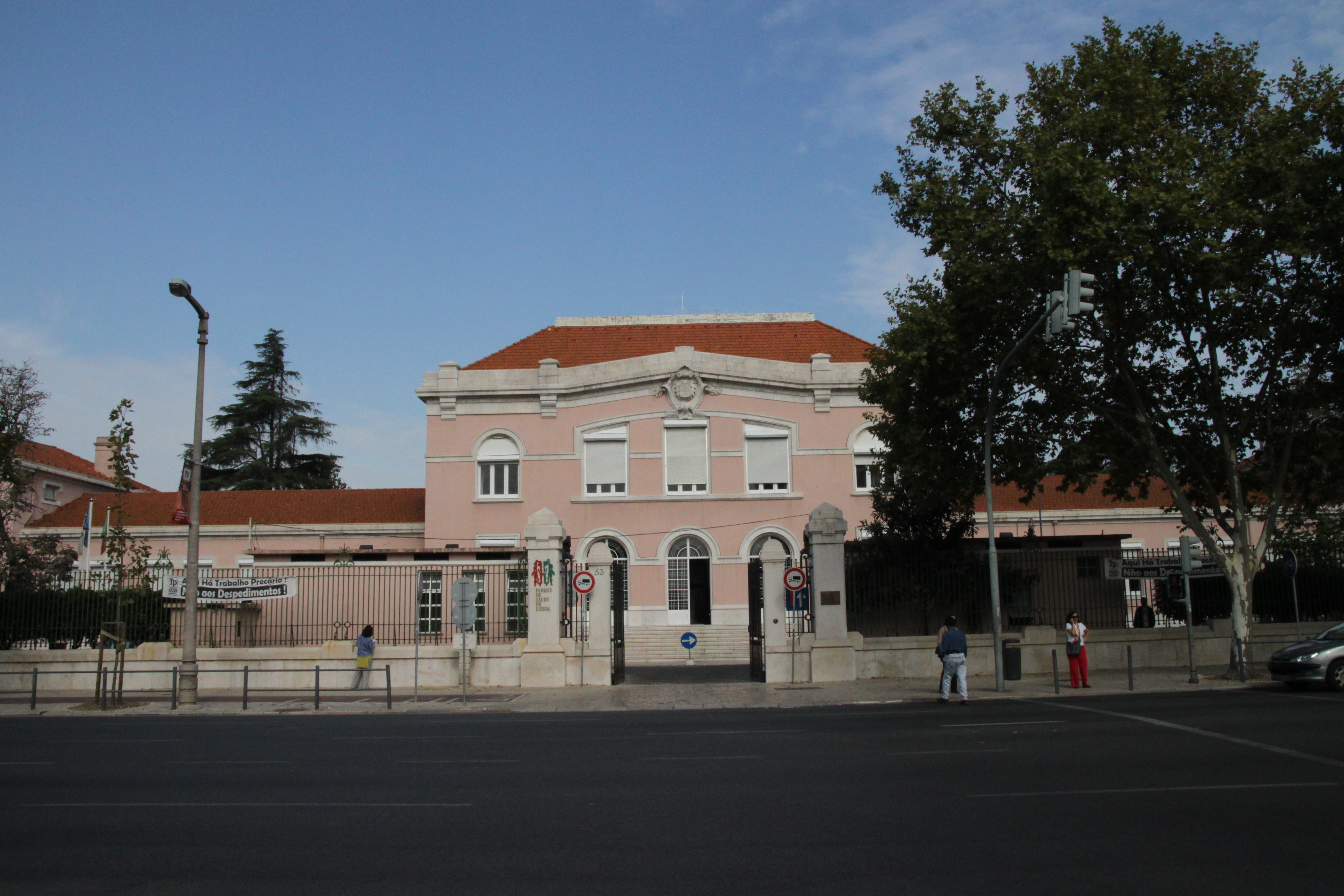 Hospital Júlio de Matos This file was uploaded for Wiki Loves Monuments in Portugal with the unique identifier 97005051.